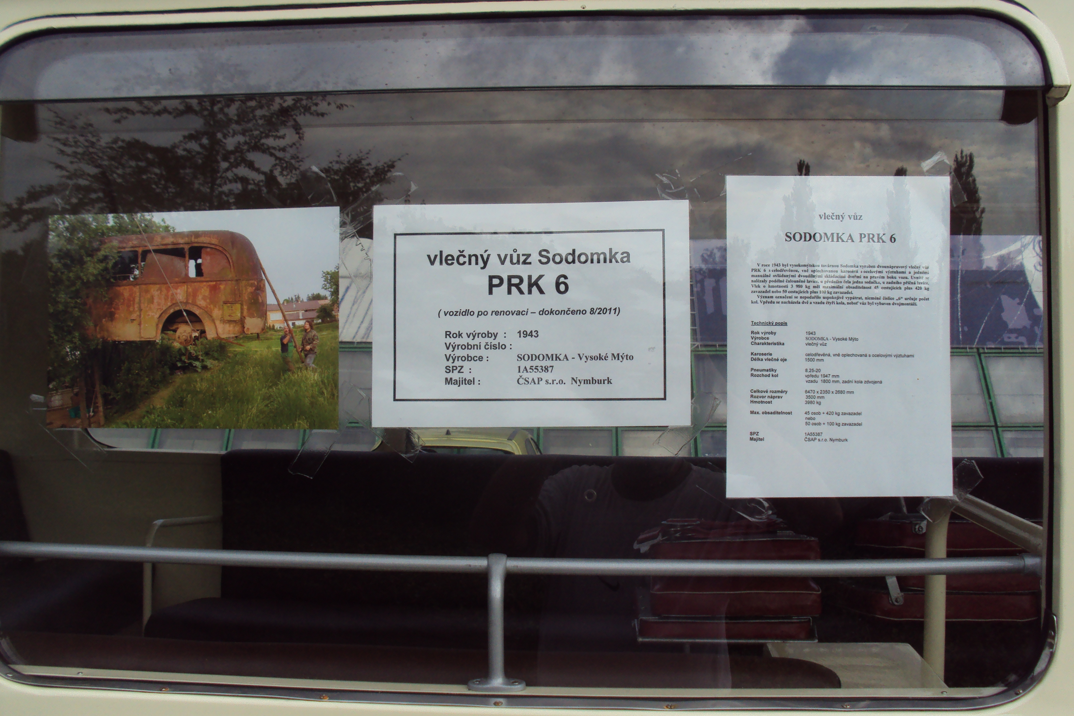 Popis na okně vlečňáku SODOMKA PRK6 při prezentaci historických busů v České Lípě